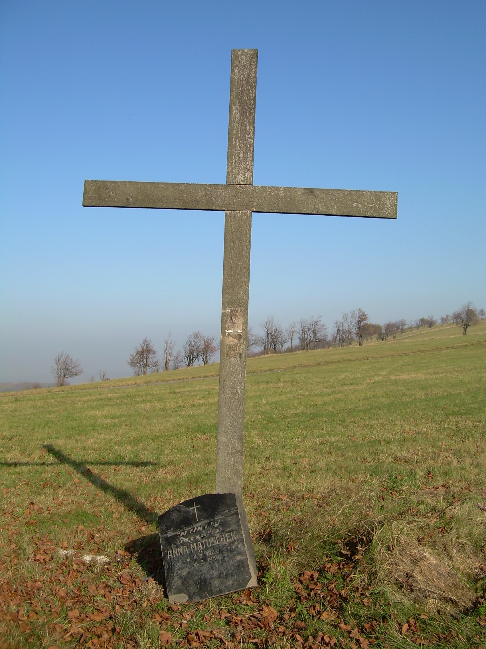 Kříž s obeliskem v Nakléřově